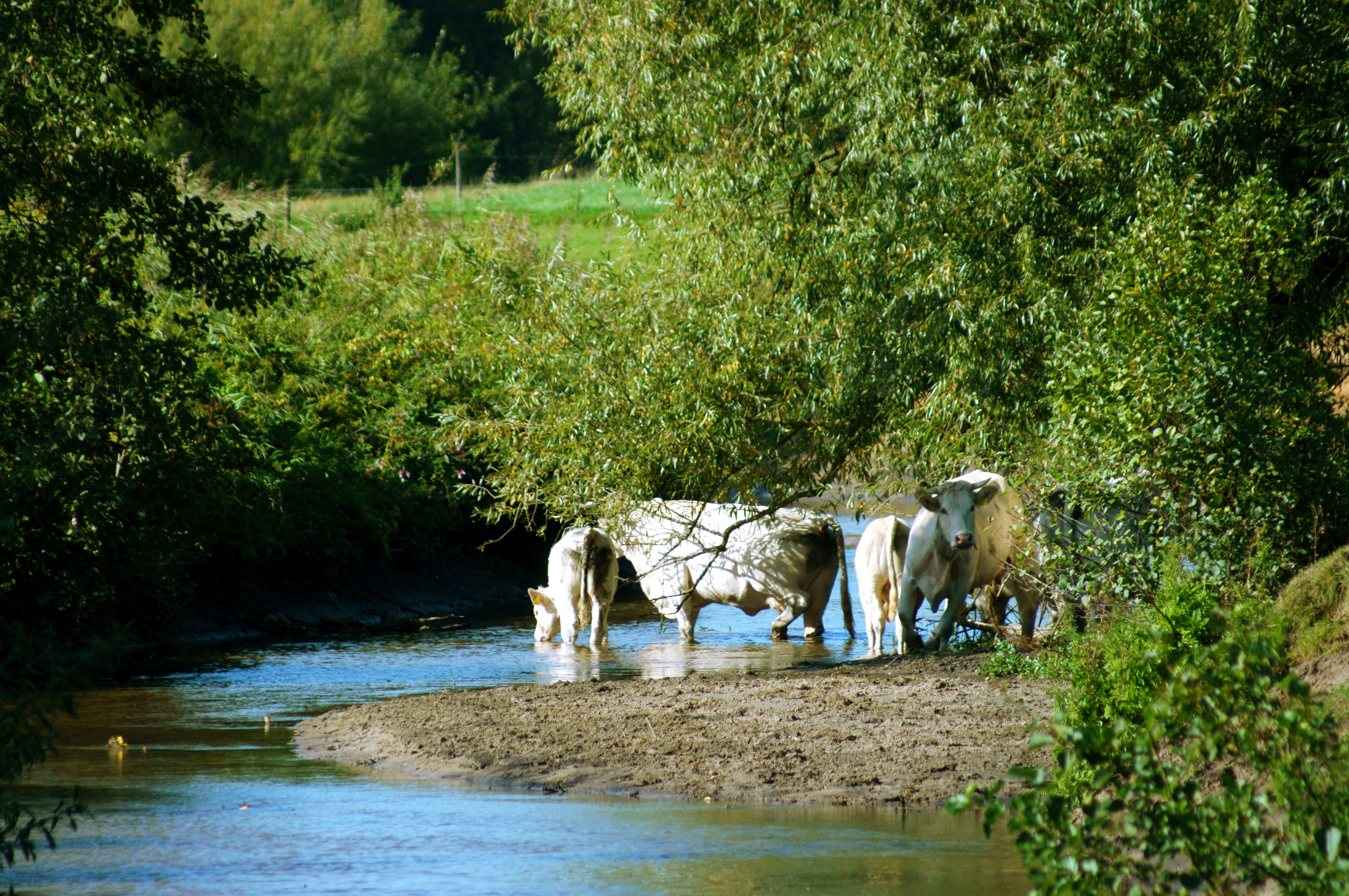 Die Berkel, ein Nebenfluss der IJssel entspringt bei Billerbeck in den Baumbergen. Bei Coesfeld tritt sie in die Ebene des Westmünsterlandes ein. Die Teleaufnahme zeigt eine Rinderherde, die sichtlich Spaß am Tollen im Flussbett hatte. Das Bild entstand in der sandigen Aue zwischen Coesfeld und Gescher.